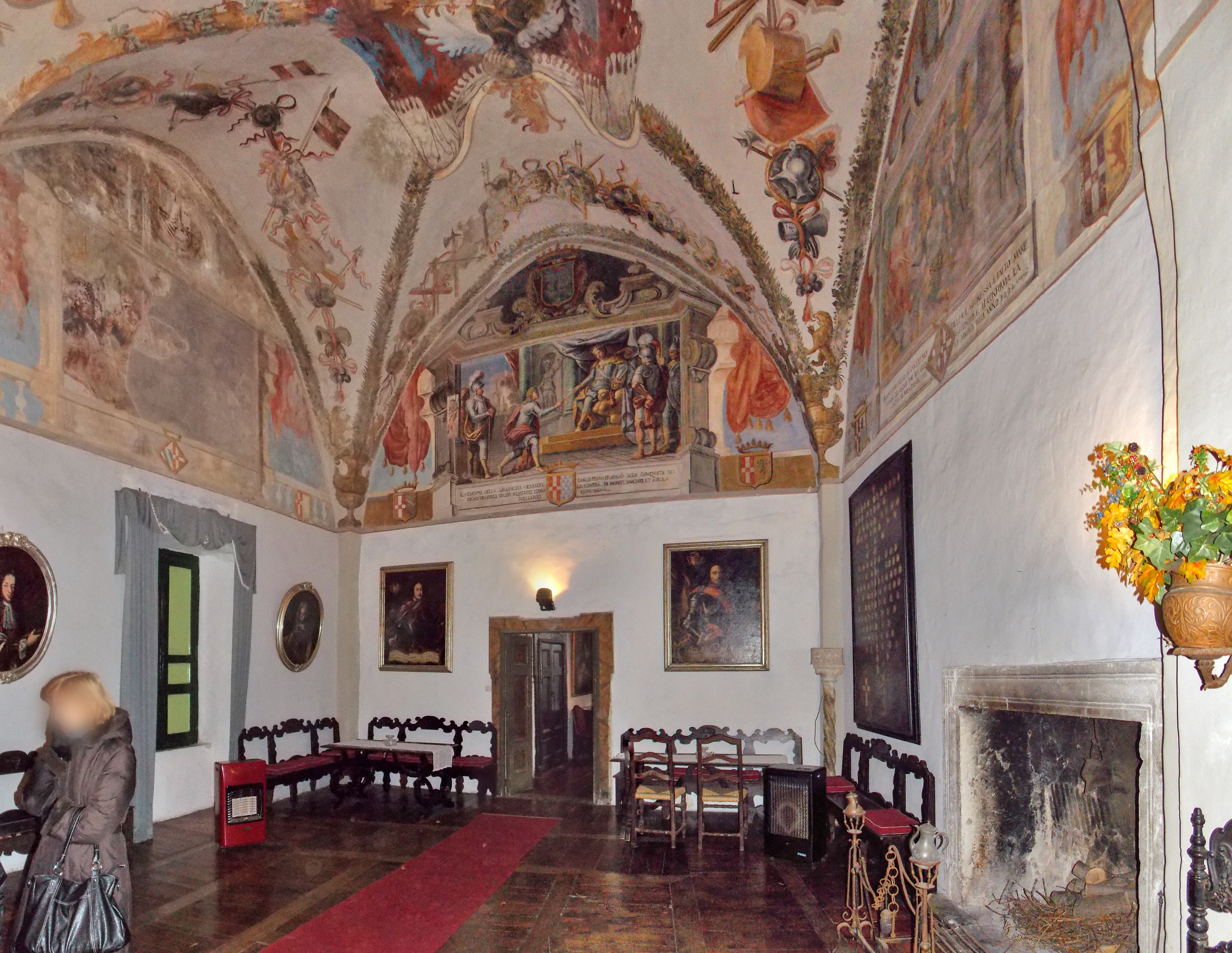 Castello Pignatelli della Leonessa a San Martino Valle Caudina (AV).